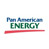 Logo Pan American Energy